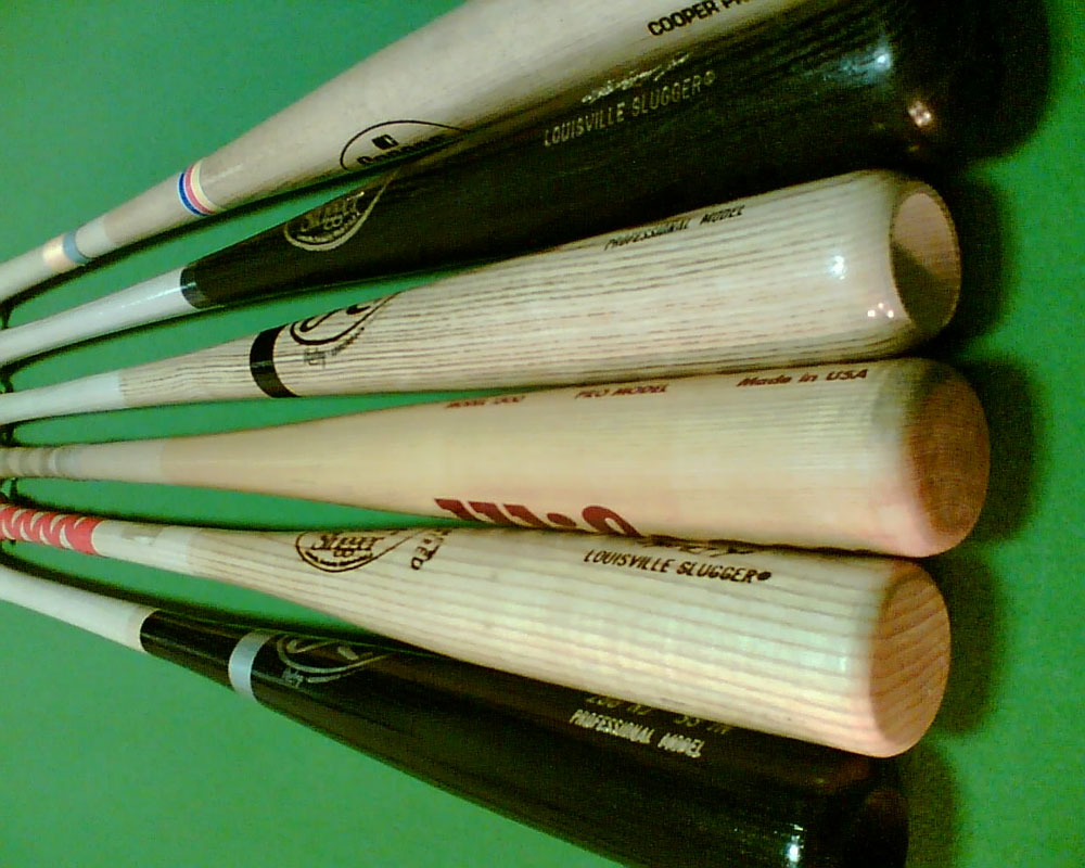 baseball bat